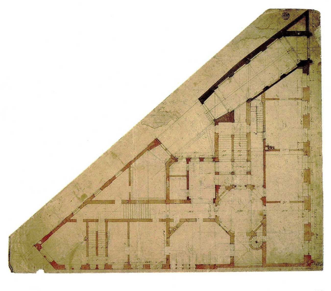 Palais Kaskel-Oppenheim in Dresden, 1845-1848 von Gottfried Semper, Grundriss